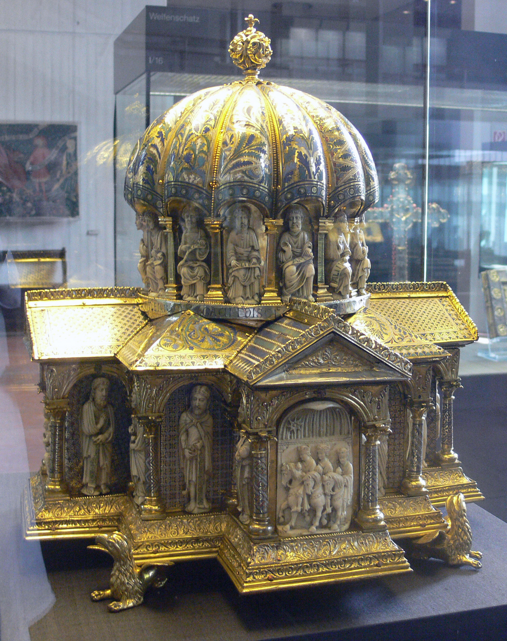 Kuppelreliquiar aus dem Welfenschatz, Köln, Ende 12. Jh.; Kunstgewerbemuseum Berlin